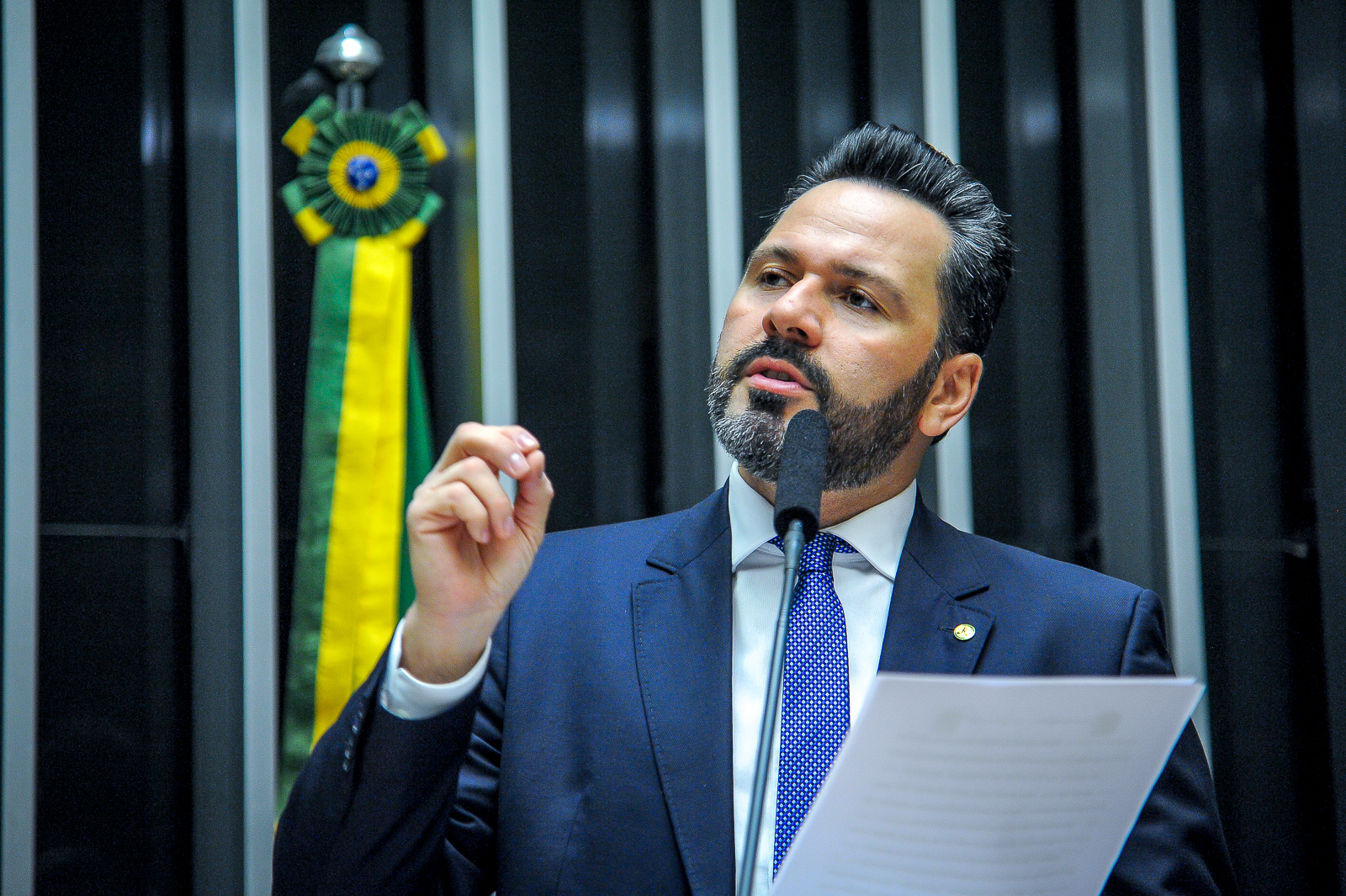 Sessão Solene em homenagem à criação do Estado de Israel, realizada pela Câmara dos Deputado. 19 de maio de 2016